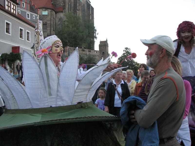 Via Thea, Görlitz 2007